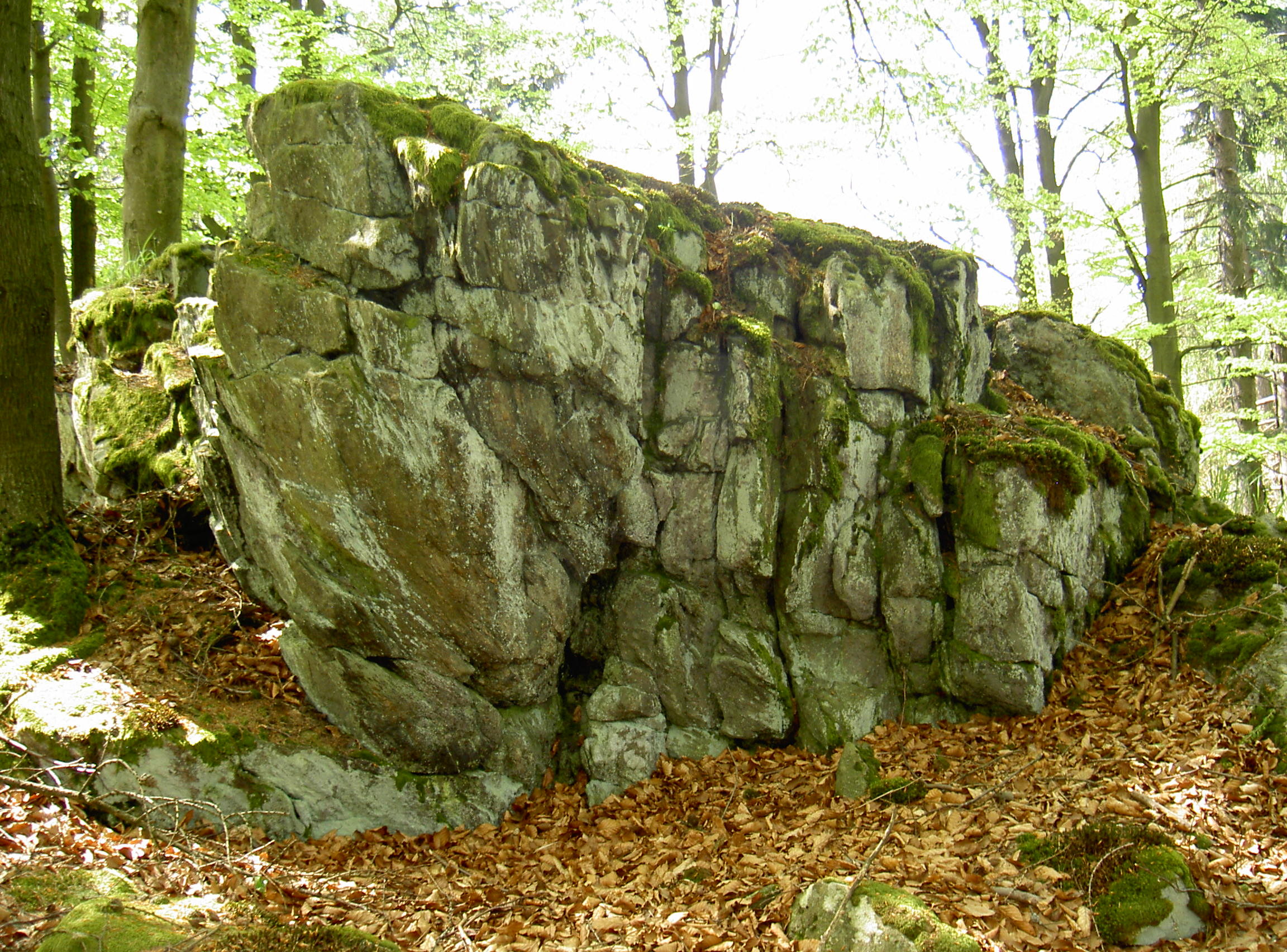 Eulenberg Gipfel